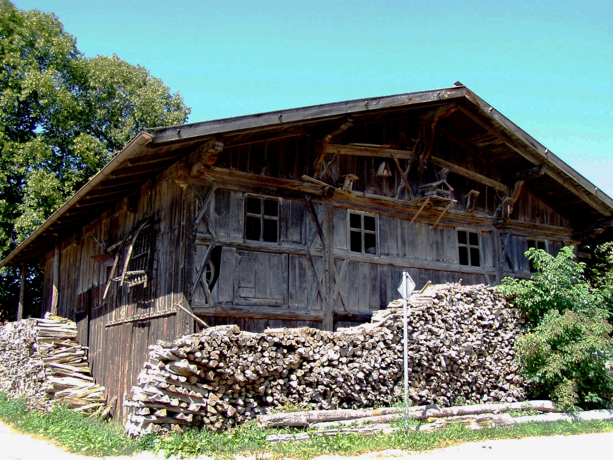 Stadel an der Dorfstraße in Schöffau, Uffing am Staffelsee